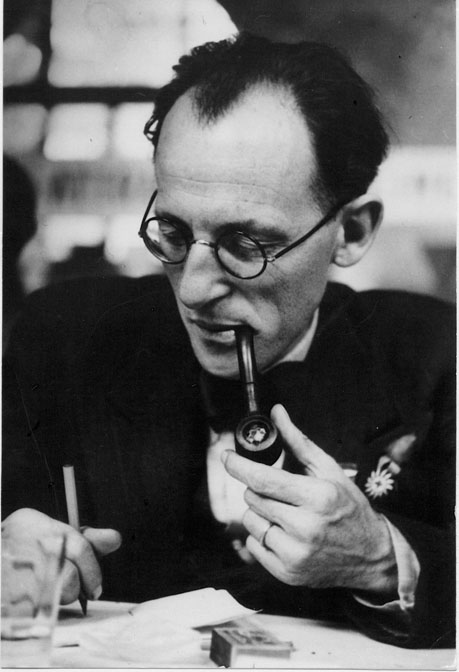 Portrait de René Leyvraz, illustrant la thèse de Françoise Larderaz présentée en 1999.